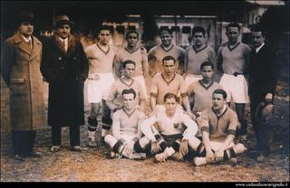 Foto Audace Cerignola